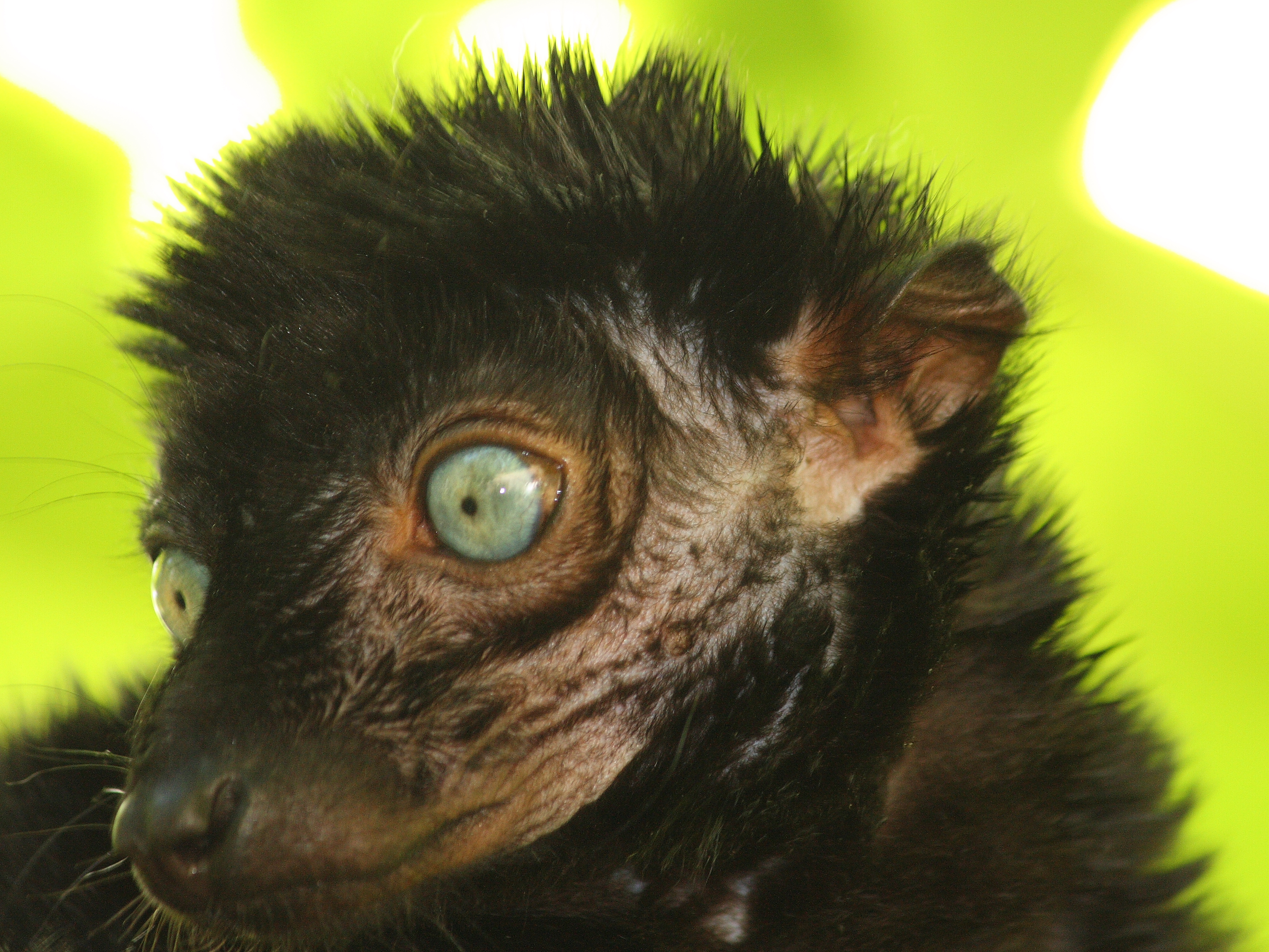 Eulemur macaco